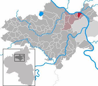 Kaltenengers in Rhineland-Palatinate - district Mayen-Koblenz